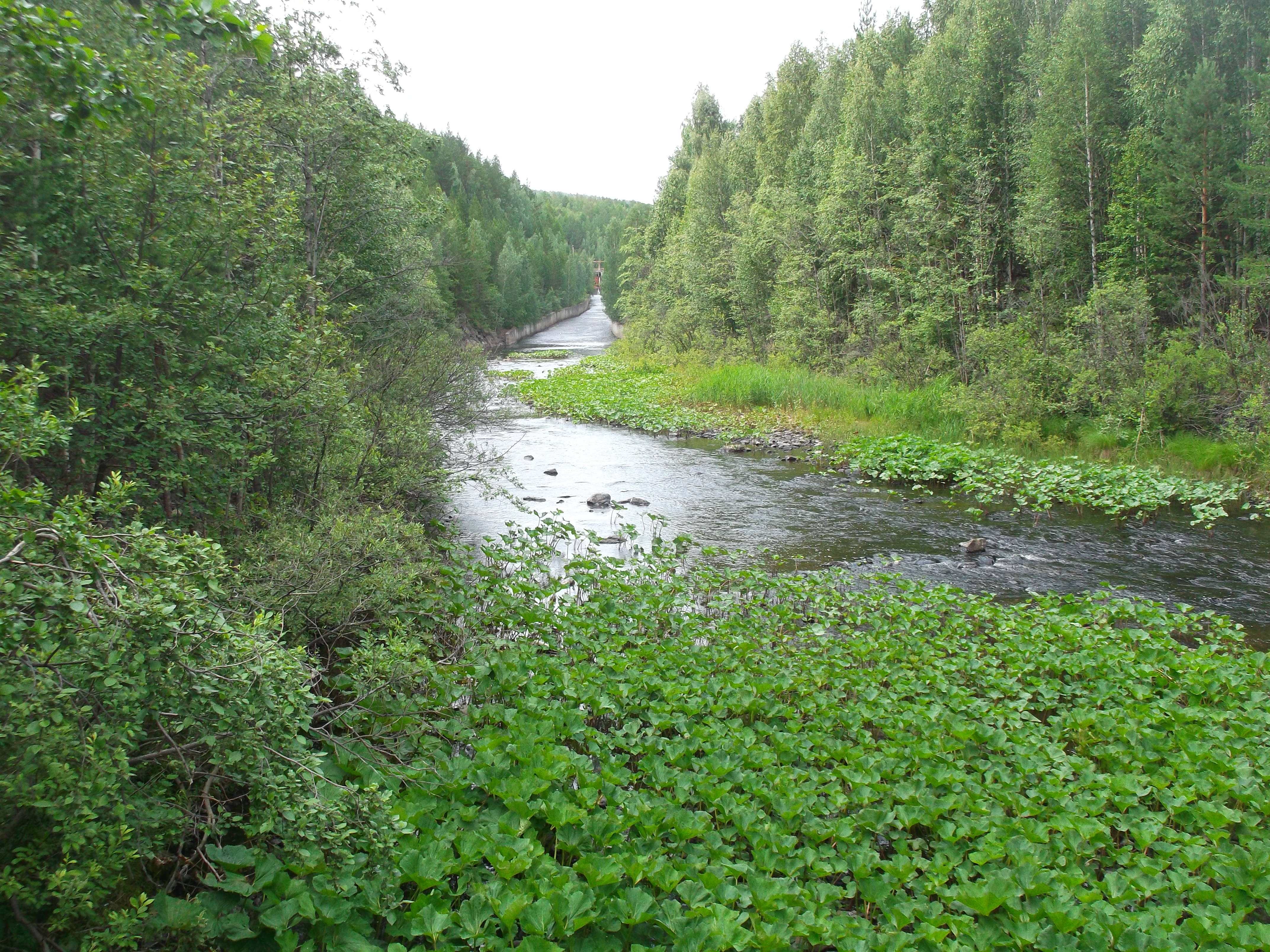 река Большой Киалим